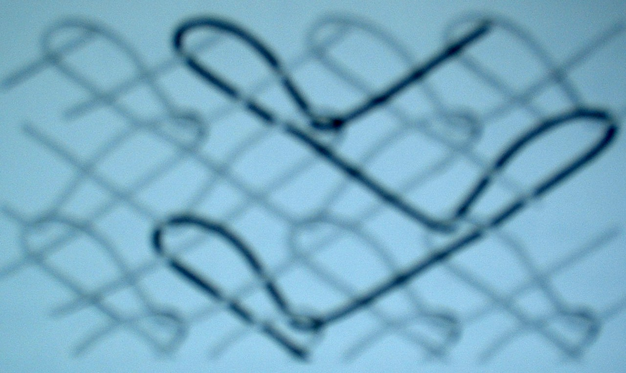 Maschenbild der offenen Tuchlegung